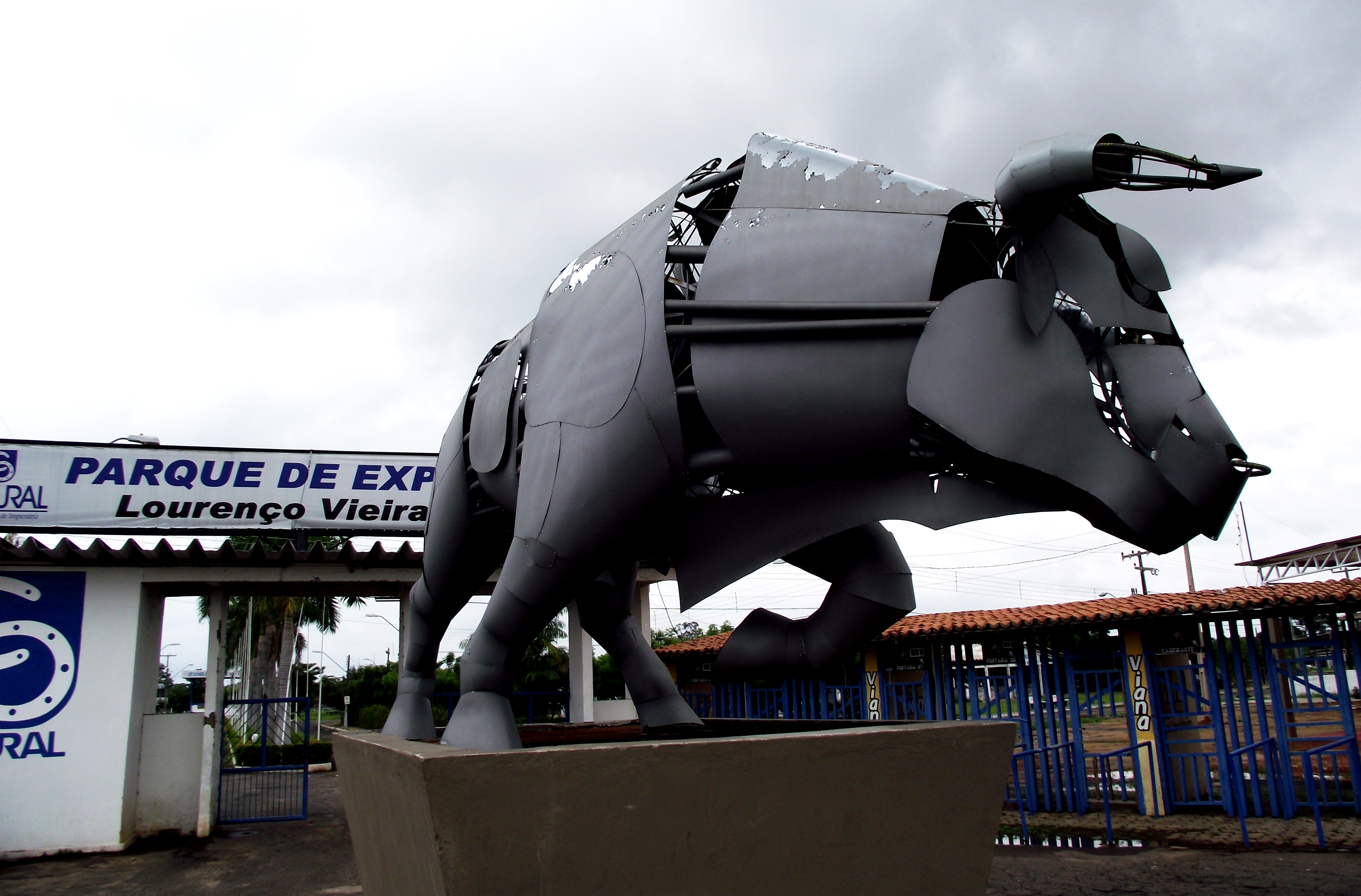 Português do Brasil: Estátua em metal de um exuberante touro. Parque de Exposições Agropecuárias Loureço Viera da Silva. Imperatriz Maranhão.